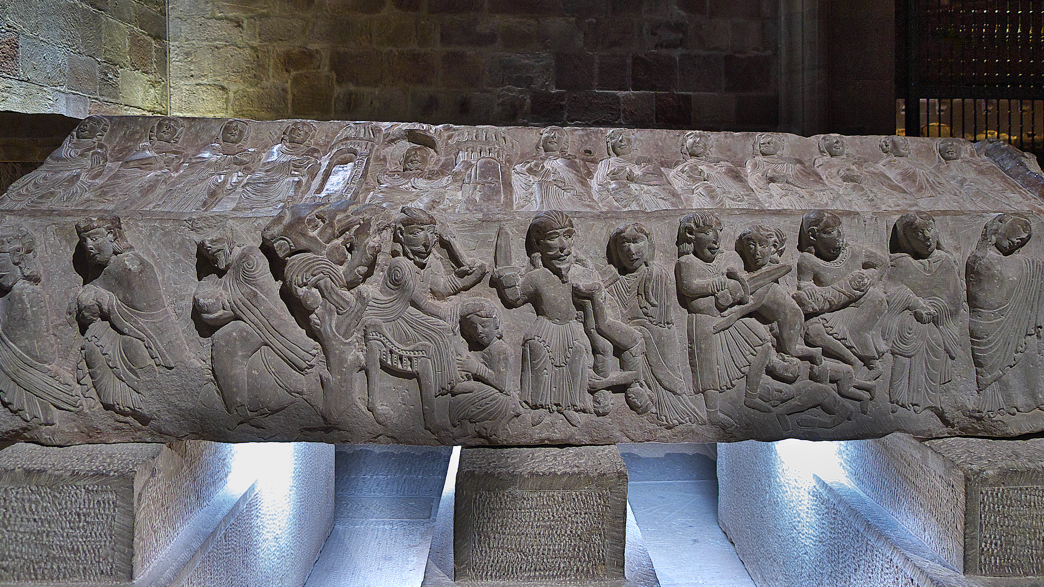 Monasterio de Santa María la Real de Nájera. Tapa secundaria del sarcófago románico (ca. 1158) de Blanca Garcés de Navarra. El artista (Leodegarius?) presenta, magníficamente, escenas bíblicas.